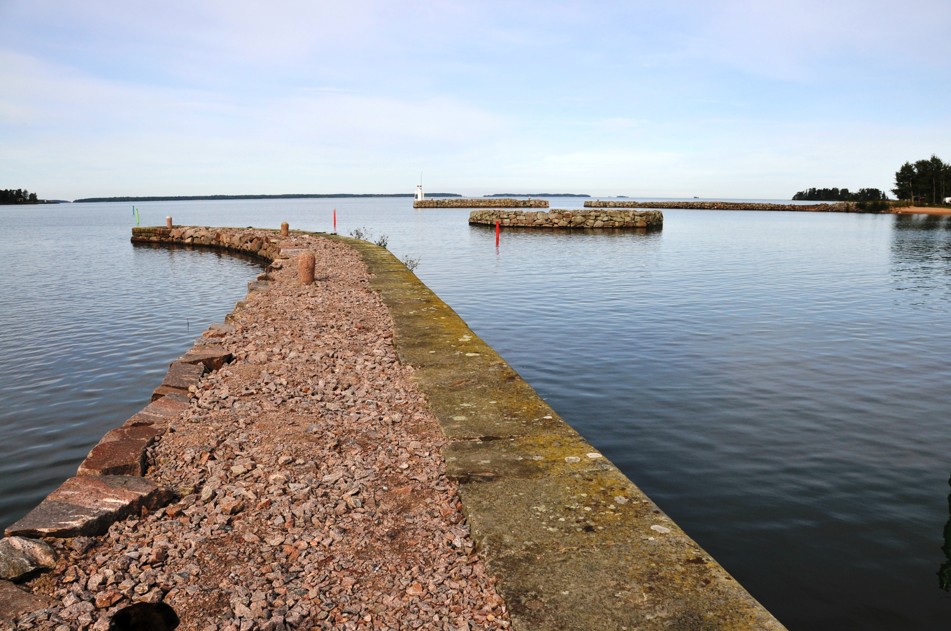 Mündung des Götakanals in den Vänernsee